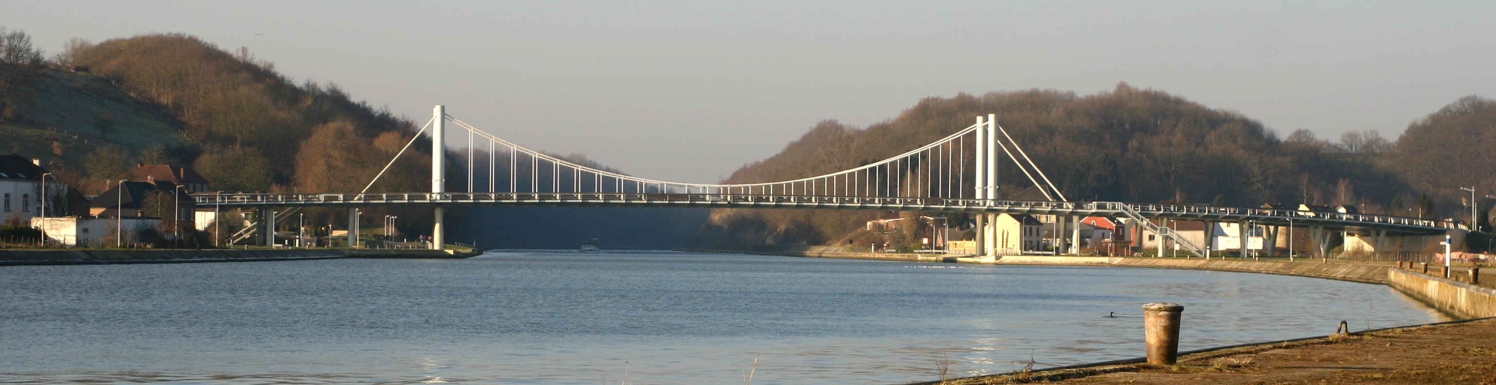 Bréck vu Kanne vum Hafen aus gesinn.